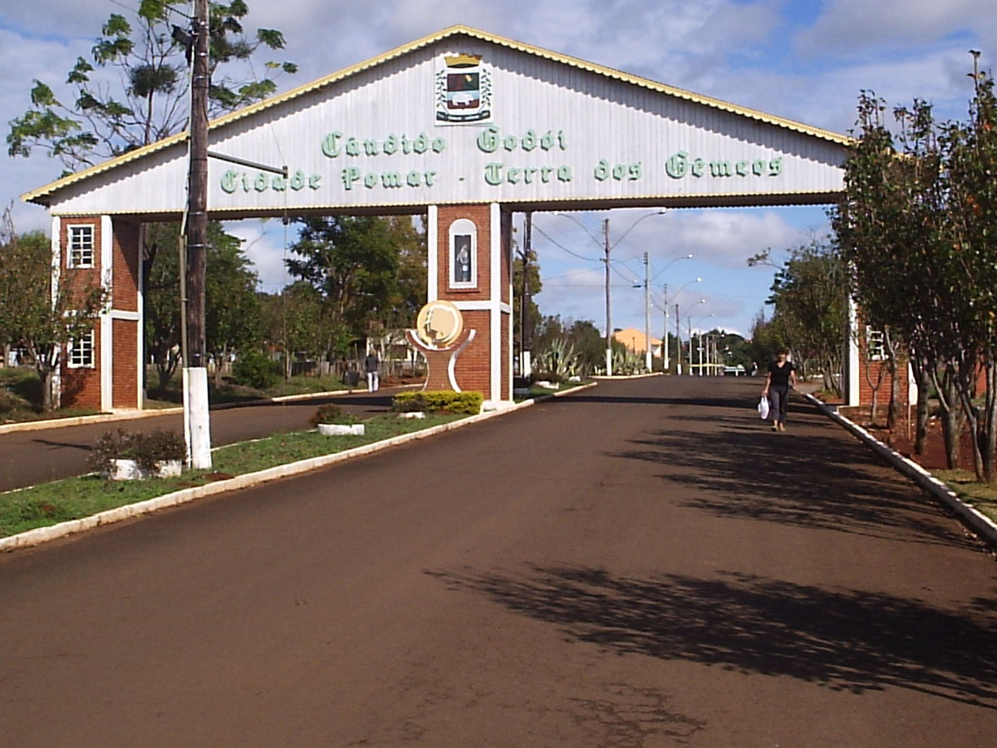 Pórtico de entrada de Cândido Godói, Rio Grande do Sul, Brasil.